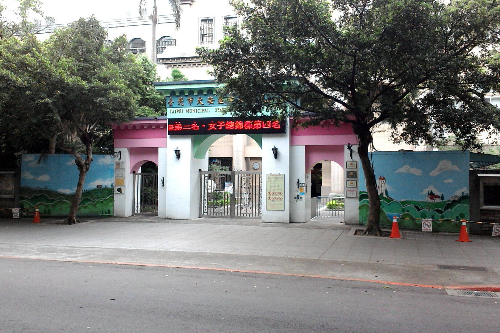 台北市大安區幸安國民小學,台北市大安區新生次分區民炤里